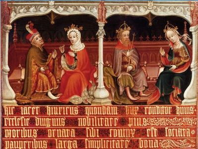 Jindřich Lev a Ota IV. Brunšvický s manželkami